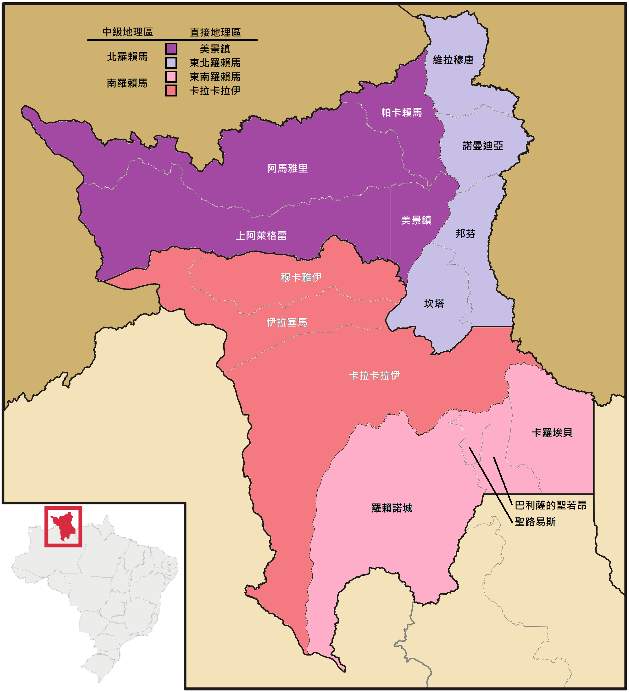 中文（香港）: 羅賴馬州市鎮列表。